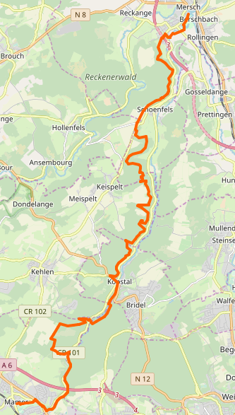 Streck vum Mamer-Pad